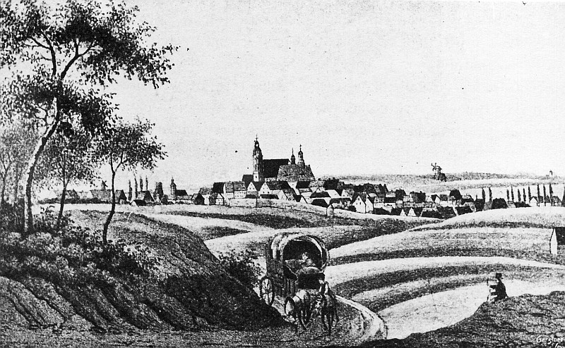 Original image description from the Deutsche Fotothek Oschatz. Stadtansicht um 1830